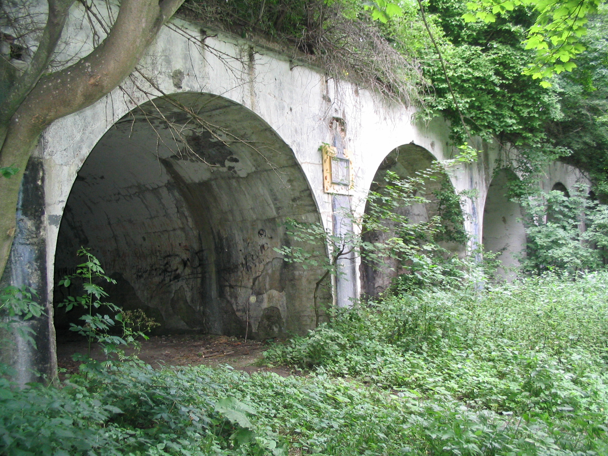 Fort VII "Prałkowce" Author: Goku122